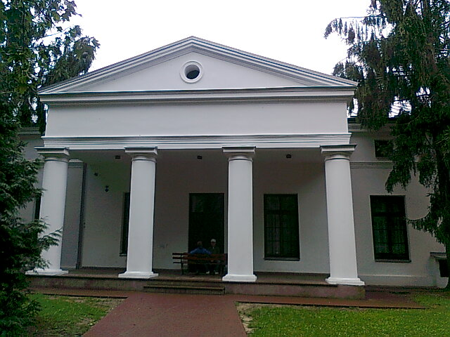 Ryki, pałac Poniatowskiego, sierpień 2012